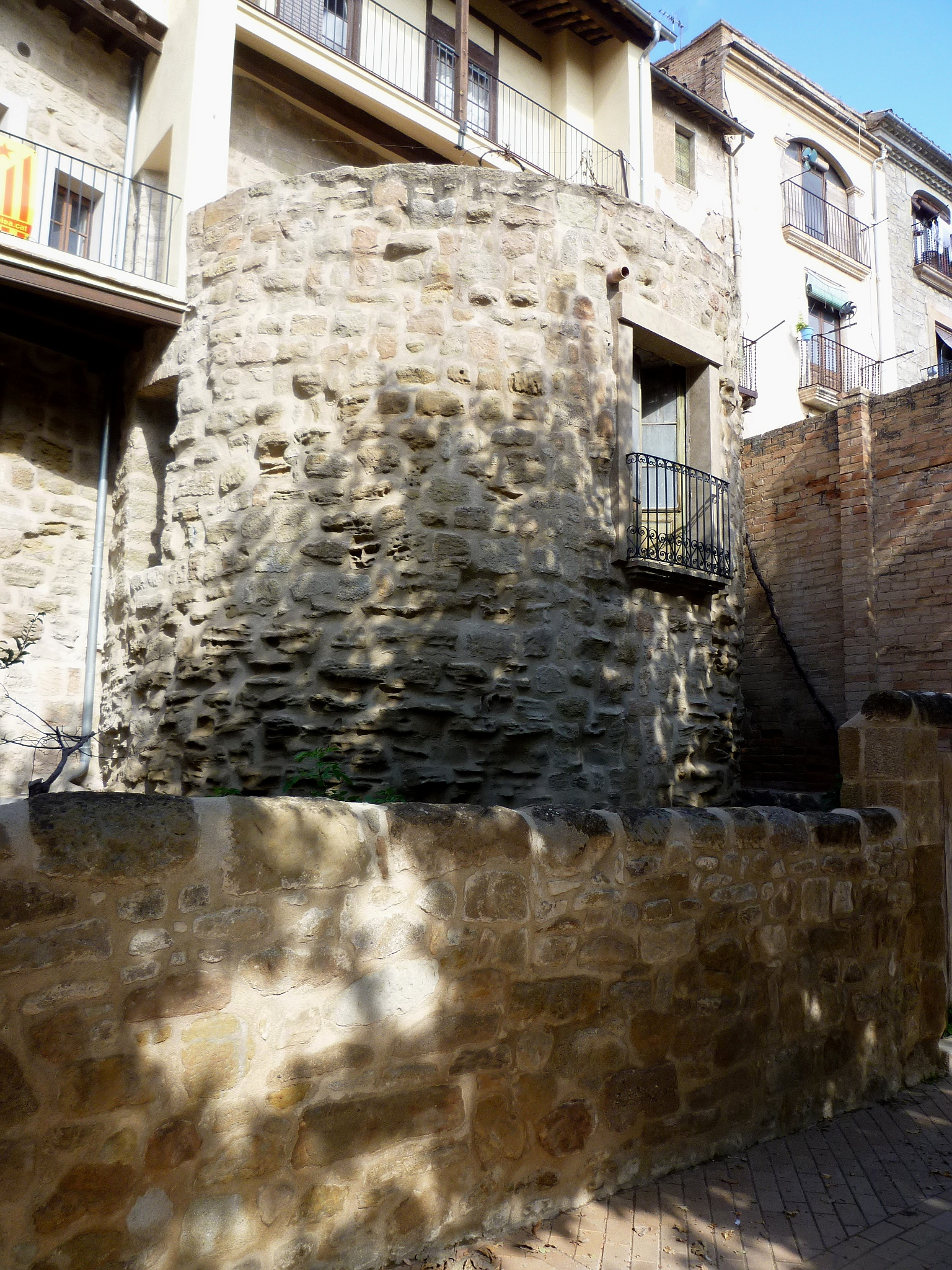 Recinte murat de Solsona: posterior de la casa de cal Membrilla